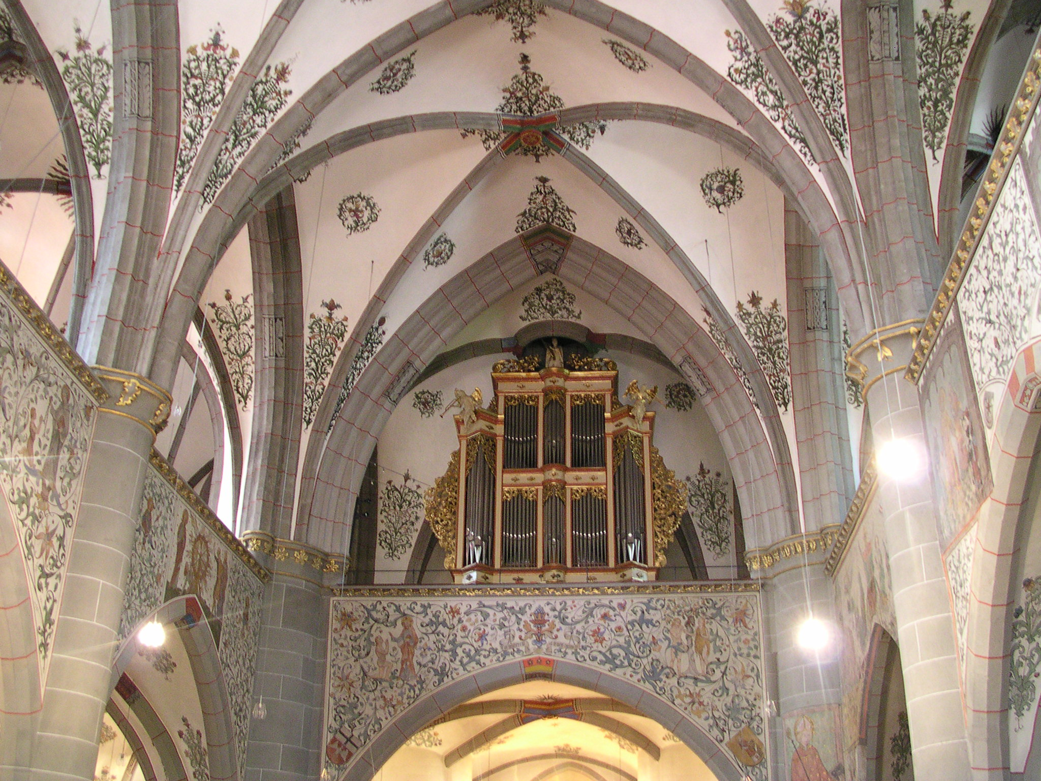 Ahrweiler, katholische Pfarrkirche St. Laurentius Emporenbemalung (Fresken) und Orgel (Gehäuse von Georg Hondt, 1726)